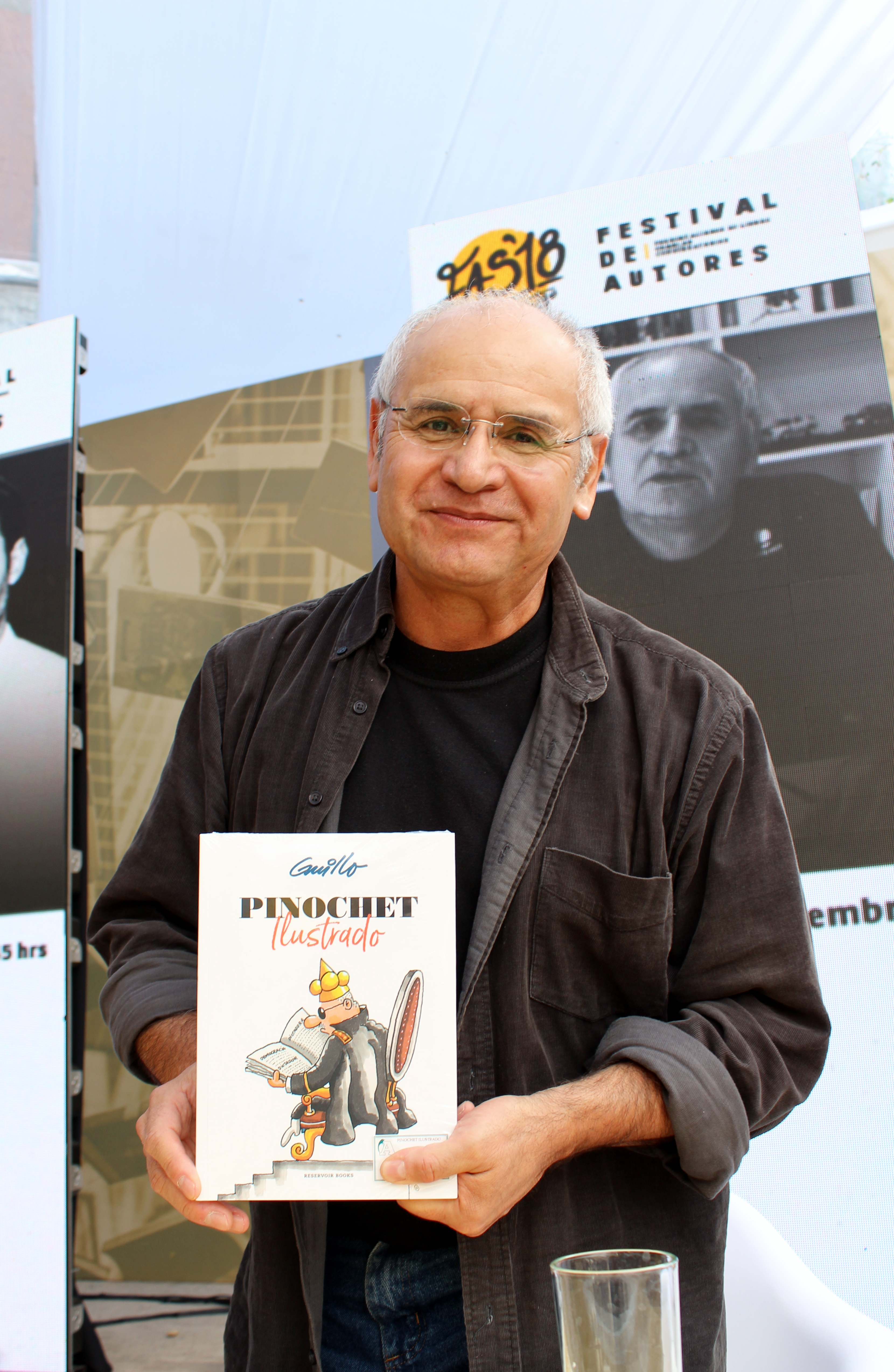 El historietista chileno Guillo en la segunda etapa del Festival de Autores de Santiago 2018 realizada en el GAM.